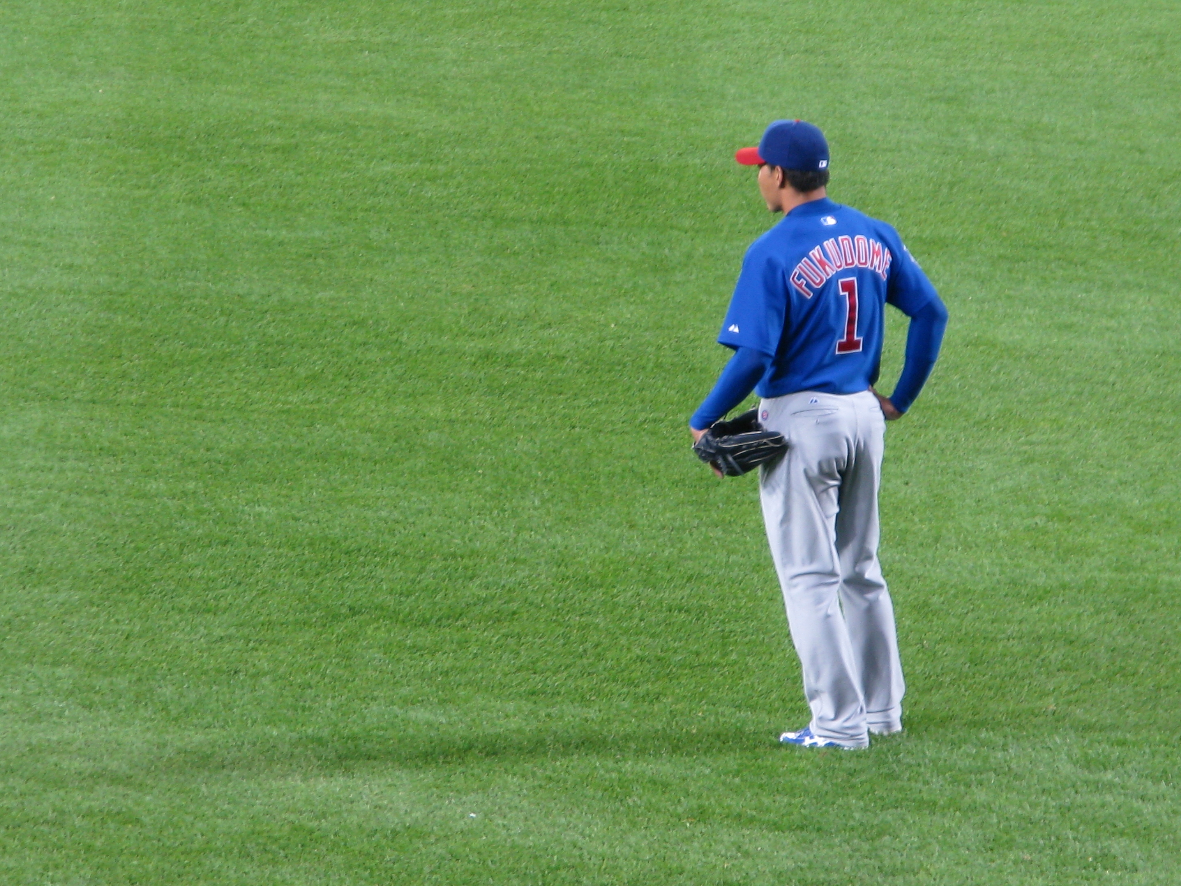 Kosuke Fukudome